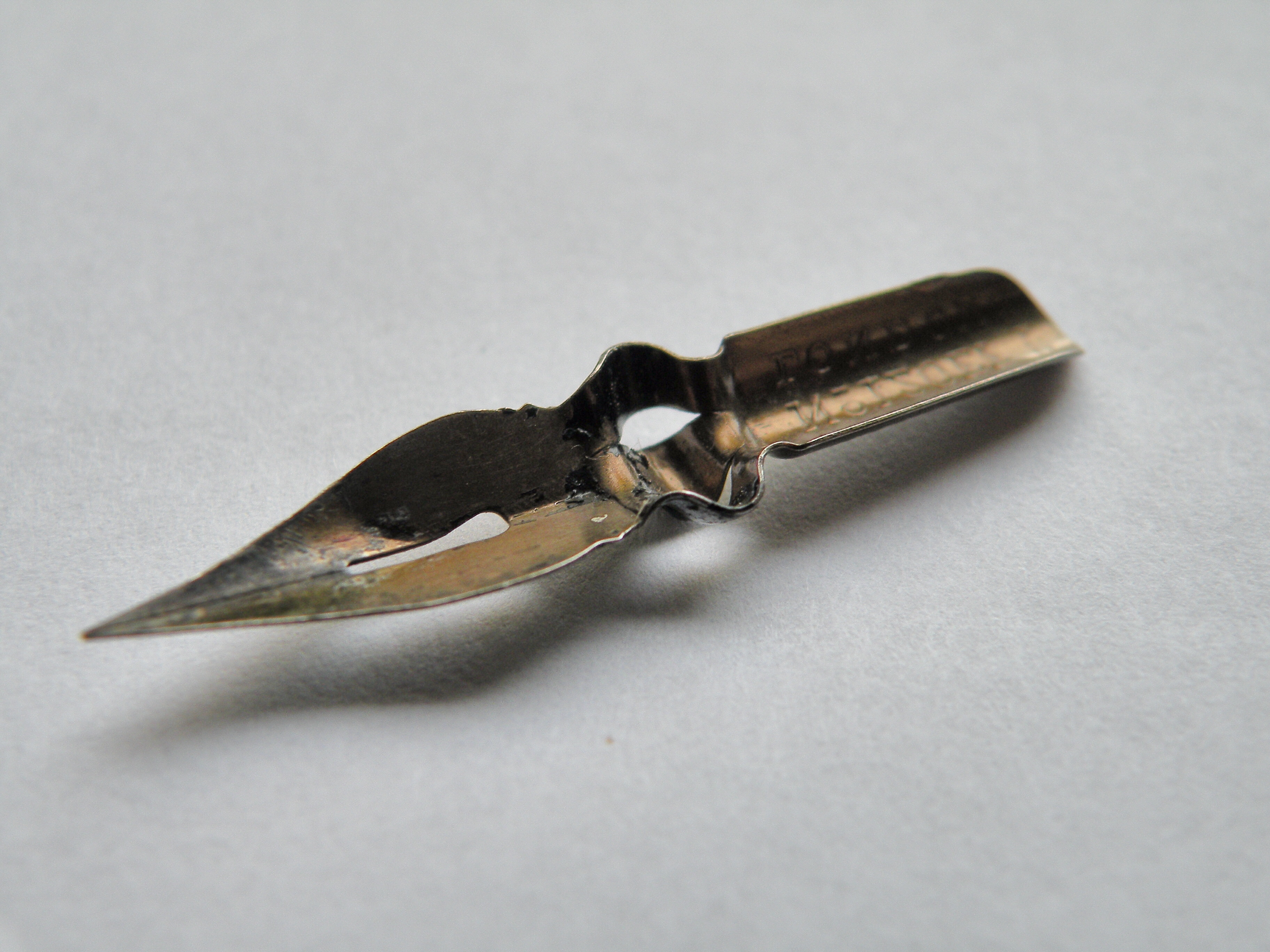 Ouderwetse kroontjespen te gebruiken in een penhouder en te dopen in een inktpot